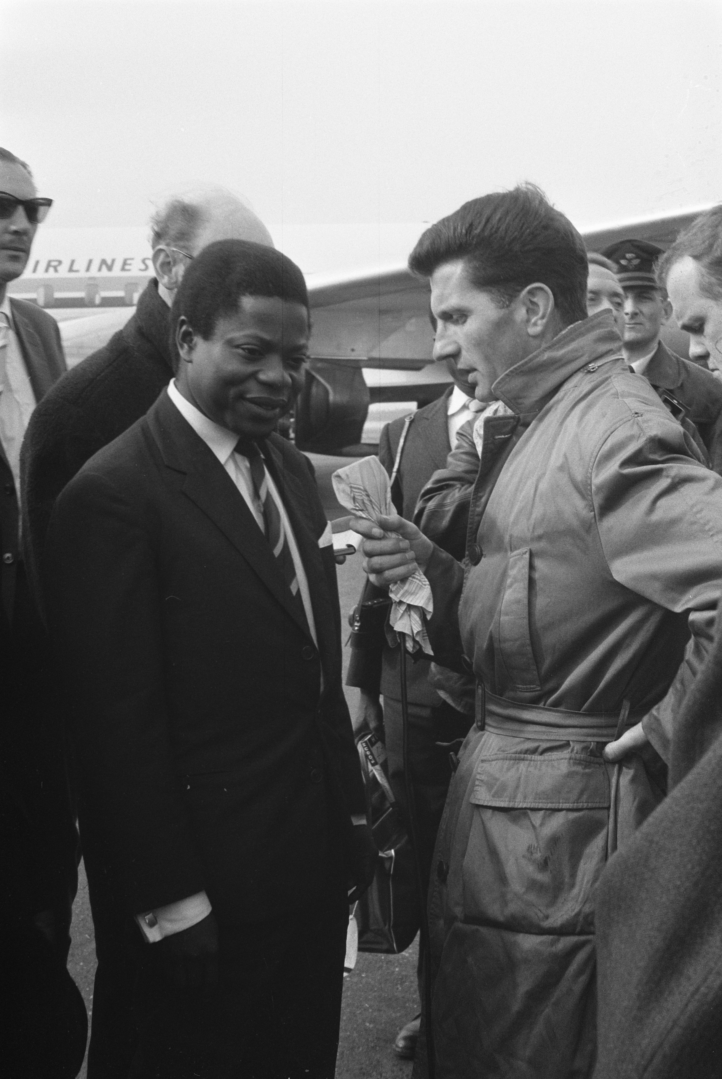 Collectie / Archief : Fotocollectie Anefo Reportage / Serie : [ onbekend ] Beschrijving : Aankomst op Schiphol van Justin Bomboko minister in reg. Ileo op doorreis naar Parijs Datum : 30 september 1960 Locatie : Noord-Holland, Schiphol Trefwoorden : aankomsten, ministers Persoonsnaam : Justin Bomboko Fotograaf : Gelderen, Hugo van / Anefo Auteursrechthebbende : Nationaal Archief Materiaalsoort : Negatief (zwart/wit) Nummer archiefinventaris : bekijk toegang 2.24.01.05 Bestanddeelnummer : 911-6368